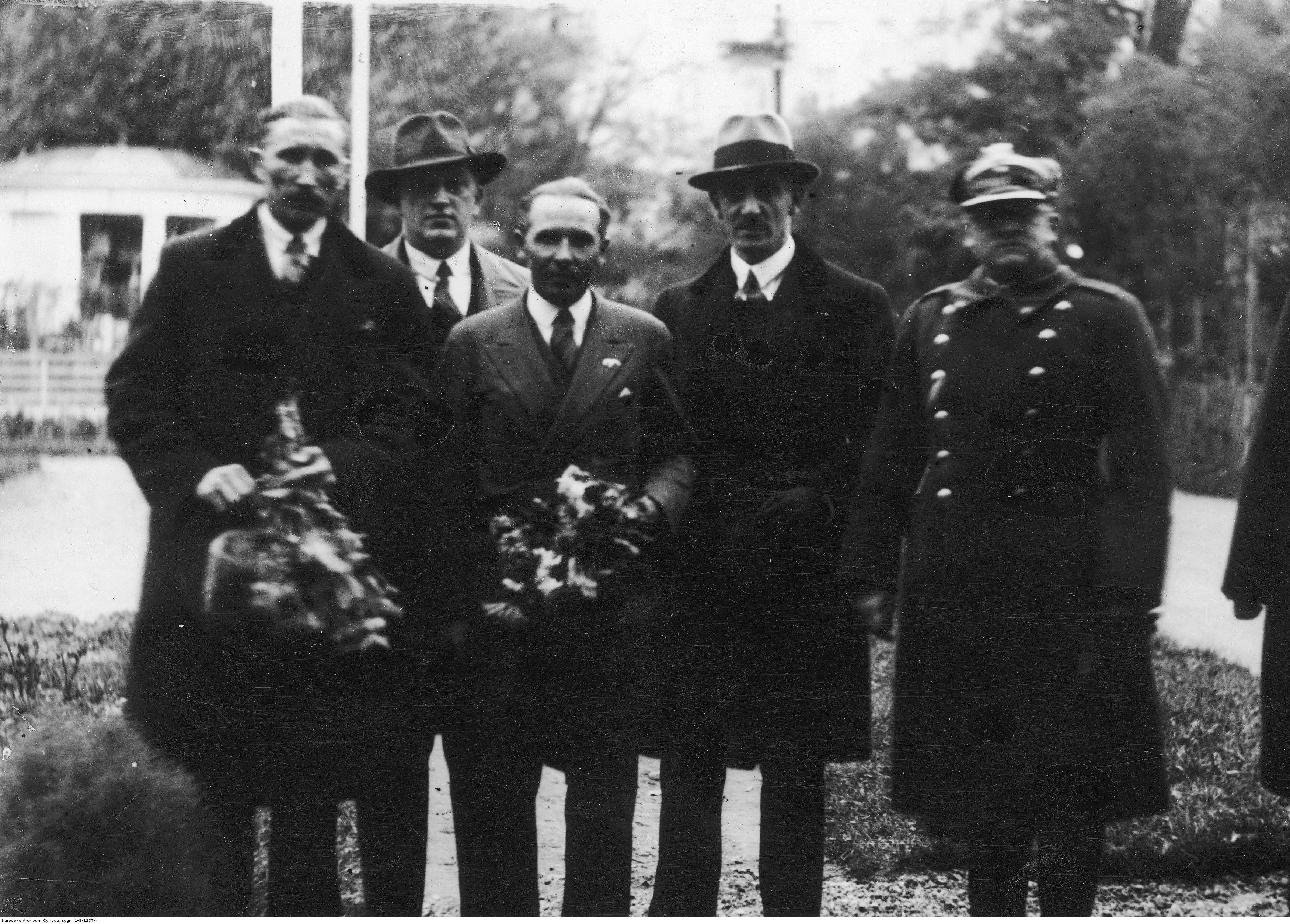 Rajd lotniczy kapitana Stanisława Karpińskiego i Wiktora Rogalskiego nad Azją Mniejszą. Kapitan Stanisława Karpiński (2. z lewej na pierwszym planie) w towarzystwie m.in. swojego mechanika Wiktora Rogalskiego (1. z lewej na pierwszym planie), dyrektora Departamentu Lotnictwa w Ministerstwie Komunikacji pułkownika Czesława Filipowicza (2. z prawej) oraz sekretarza Aeroklubu RP majora Bogdana Kwiecińskiego (1. z prawej) na wystawie pamiątek po śp. Franciszku Żwirce i Stanisławie Wigurze; październik 1932. Koncern Ilustrowany Kurier Codzienny - Archiwum Ilustracji. Sygnatura: 1-S-1237-4